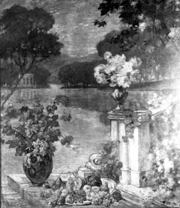 Nature morte devant un paysage, XIXe siècle